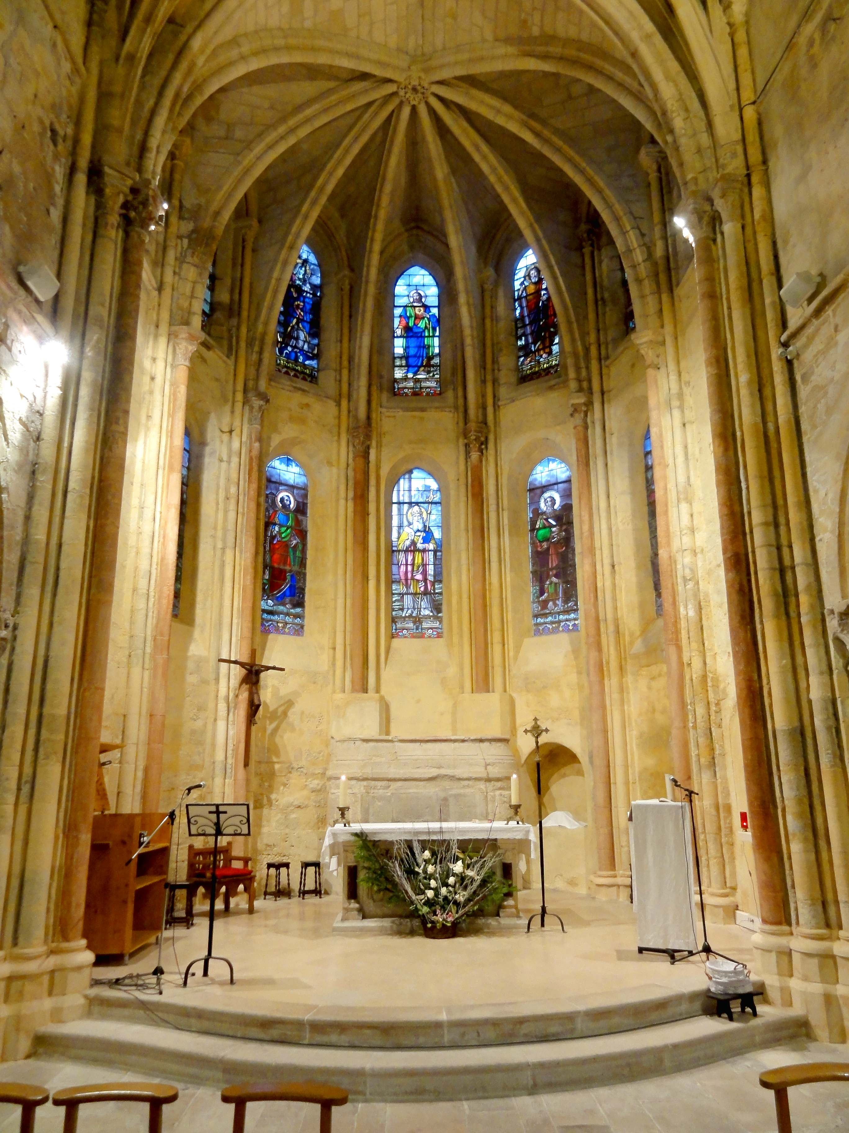 Intérieur de l'église - voir titre.